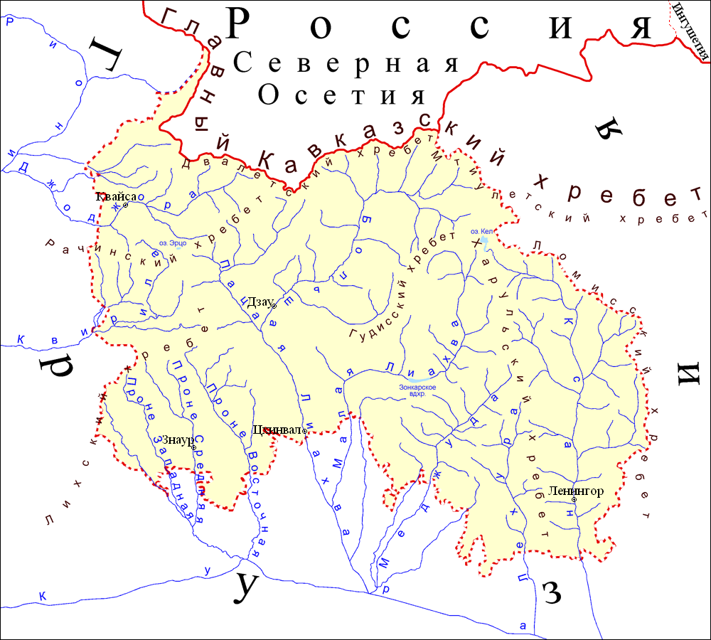 Mountain ranges & hydrography of South Ossetia